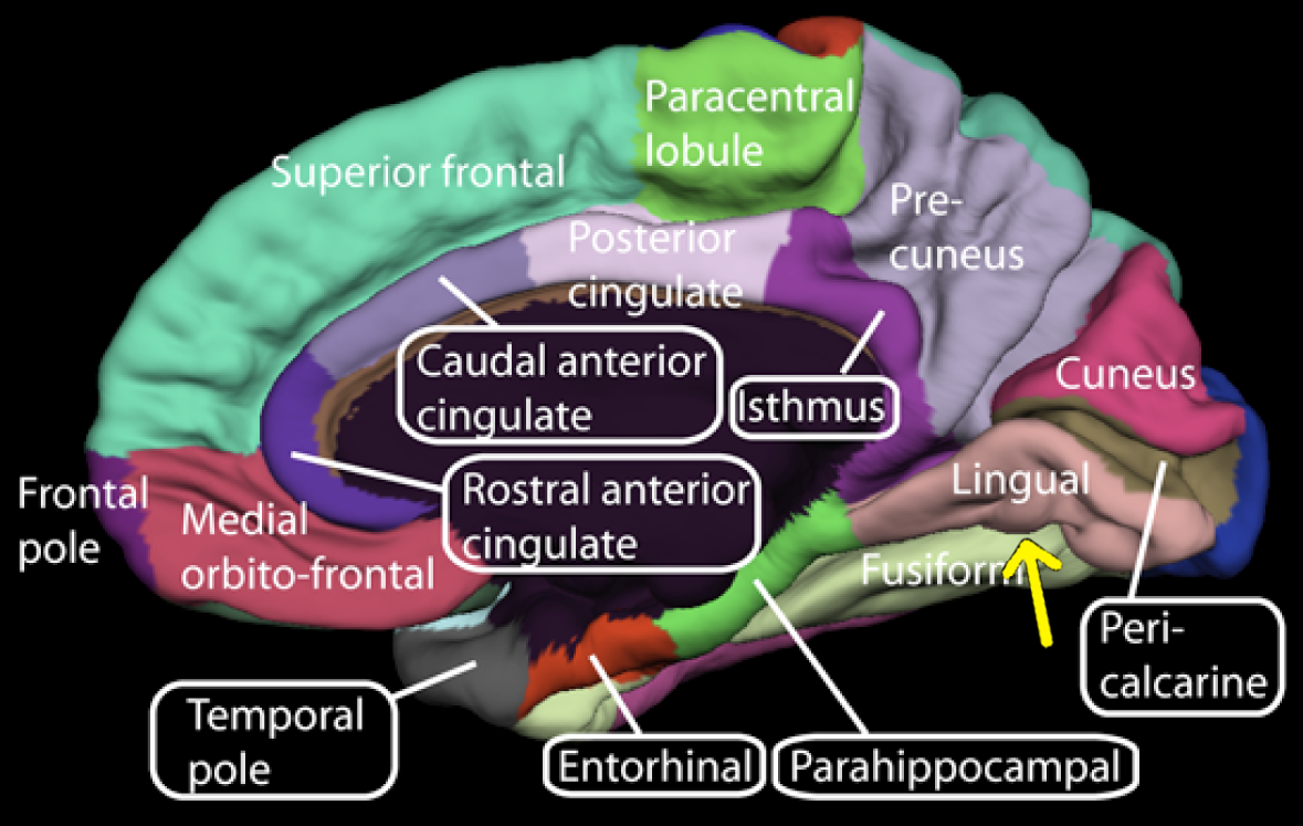 lingual_gyrus.